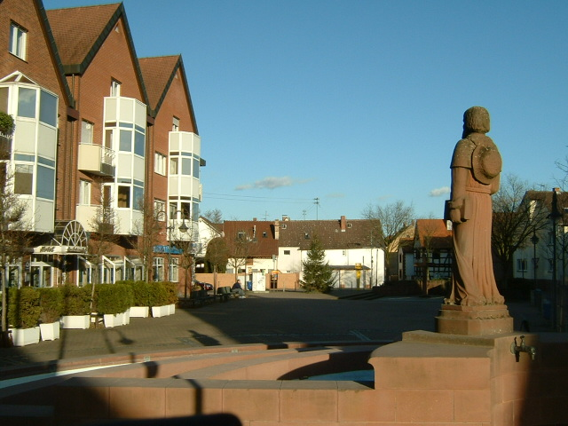 Harheim, borrough of Frankfort. Ortsmitte, Platz mit Brunnen und Ruhezone.